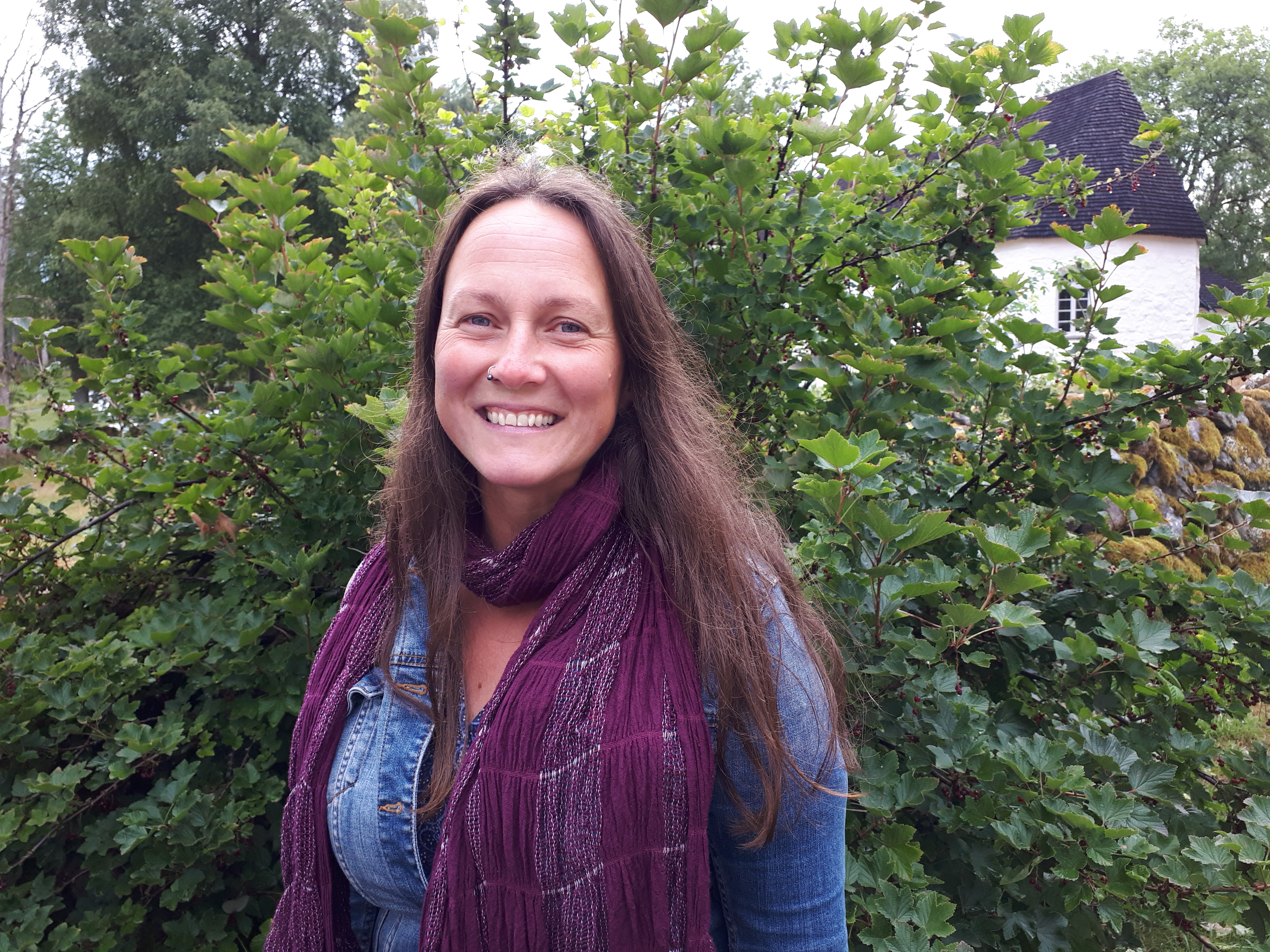 Sångerskan och spelmannen Emma Härdelin på Ornungastämman med den gamla kyrkan i bakgrunden lördagen den 11 augusti 2018 innan sin konsert med gruppen Triakel.